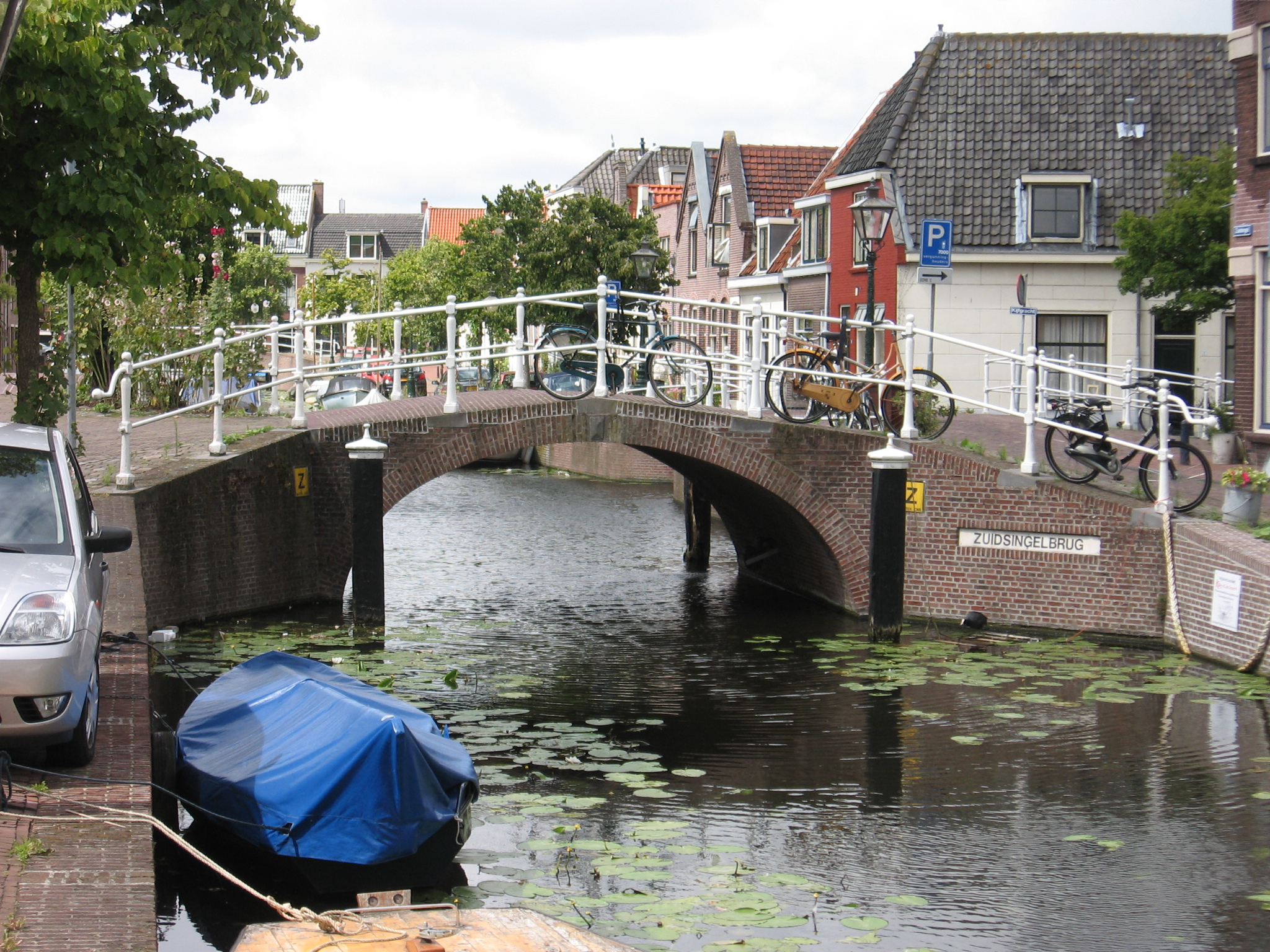 Zuidsingelbrug Leiden.jpg